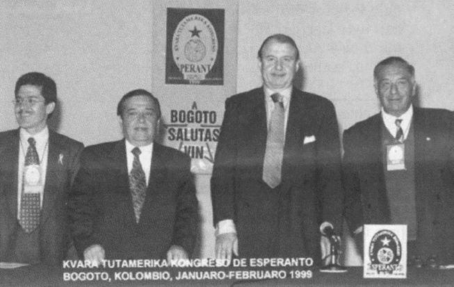 Ĉeforganizantoj: de Maldekstren, Dro Rodrigo A. Ramirez, Profesoro Luis Jorge Santos Morales, Kolombia Ministro pri kulturo Alberto Casas Sans de Santamaria kaj la ĝenerala sekretario de la kongreso Santiago Alvares Gutierrez.